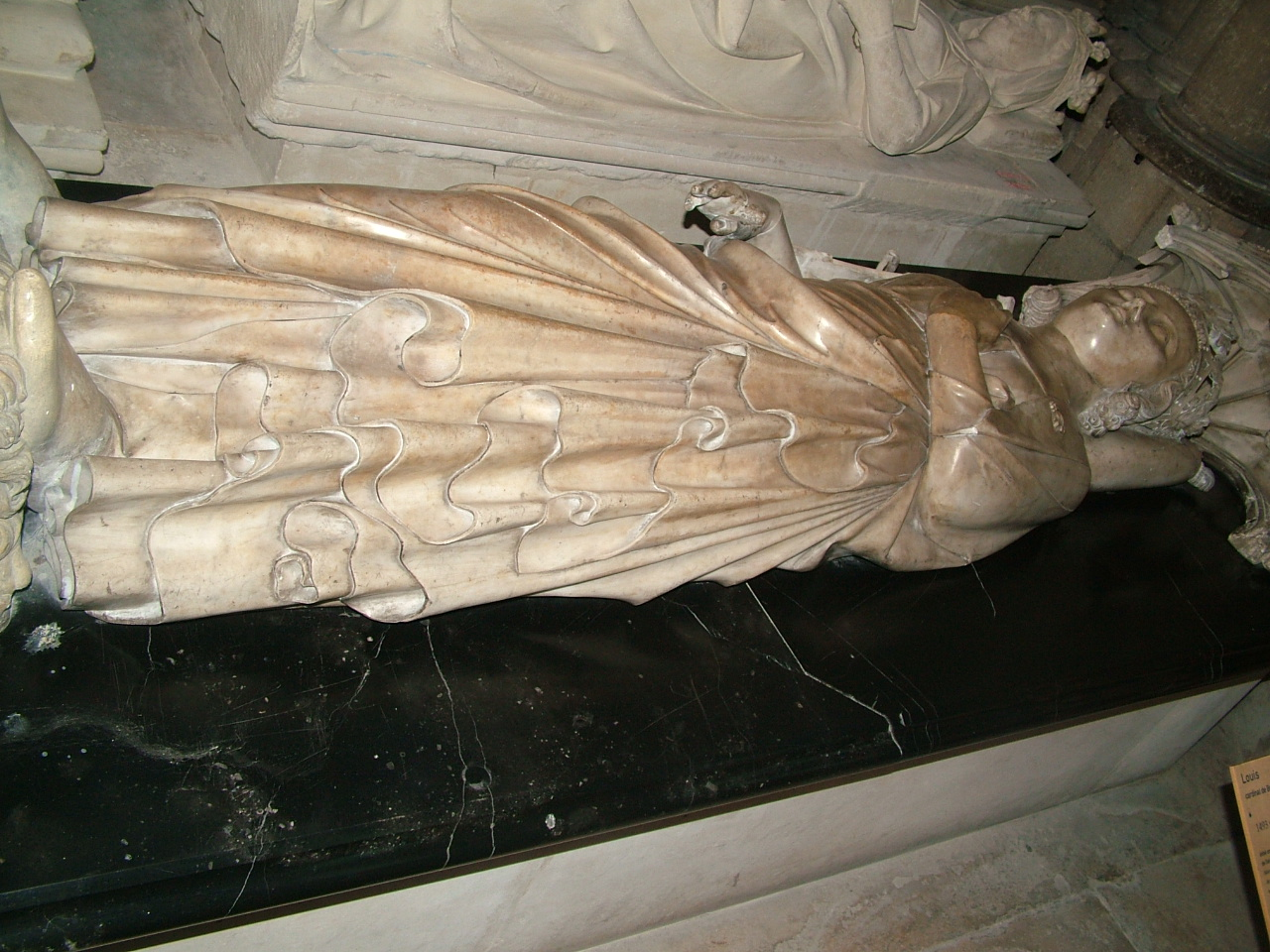 Grab König Ludwigs X. von Frankreich in Saint-Denis